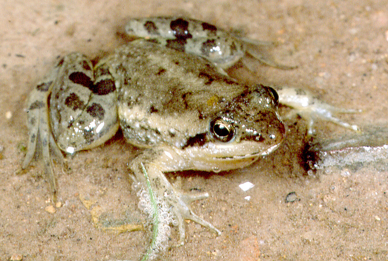 Phrynobatrachus perpalmatus